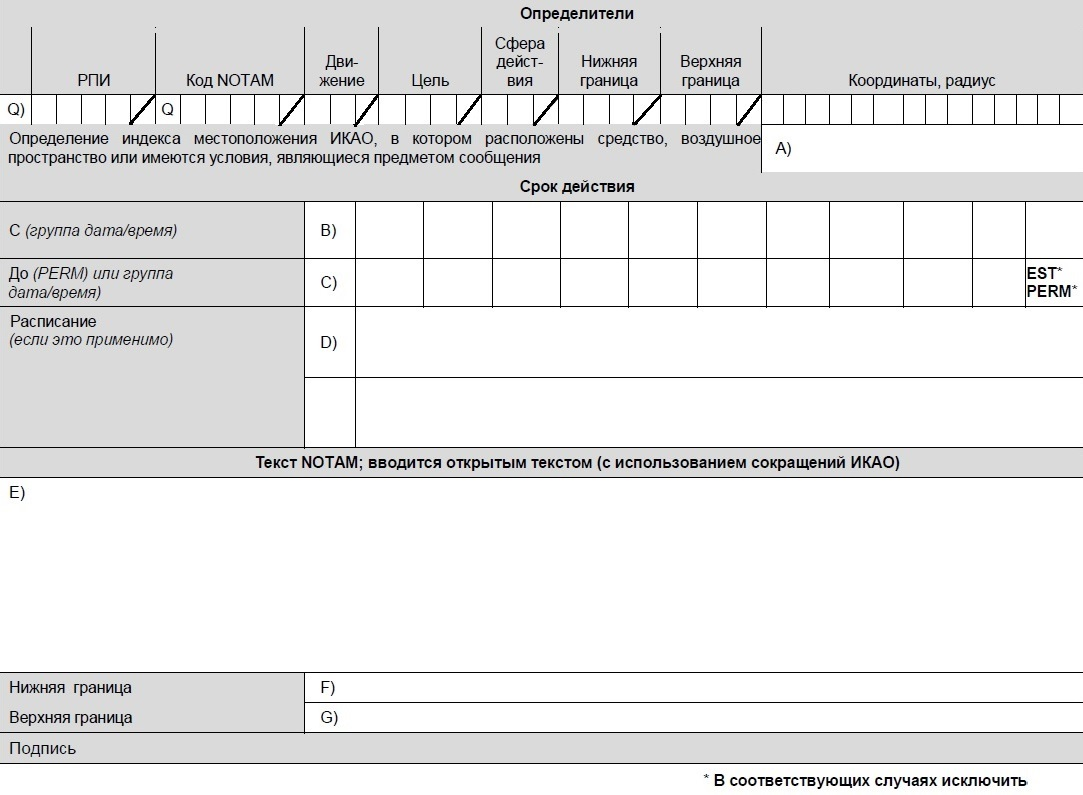 Бланк NOTAM Структура извещения NOTAM